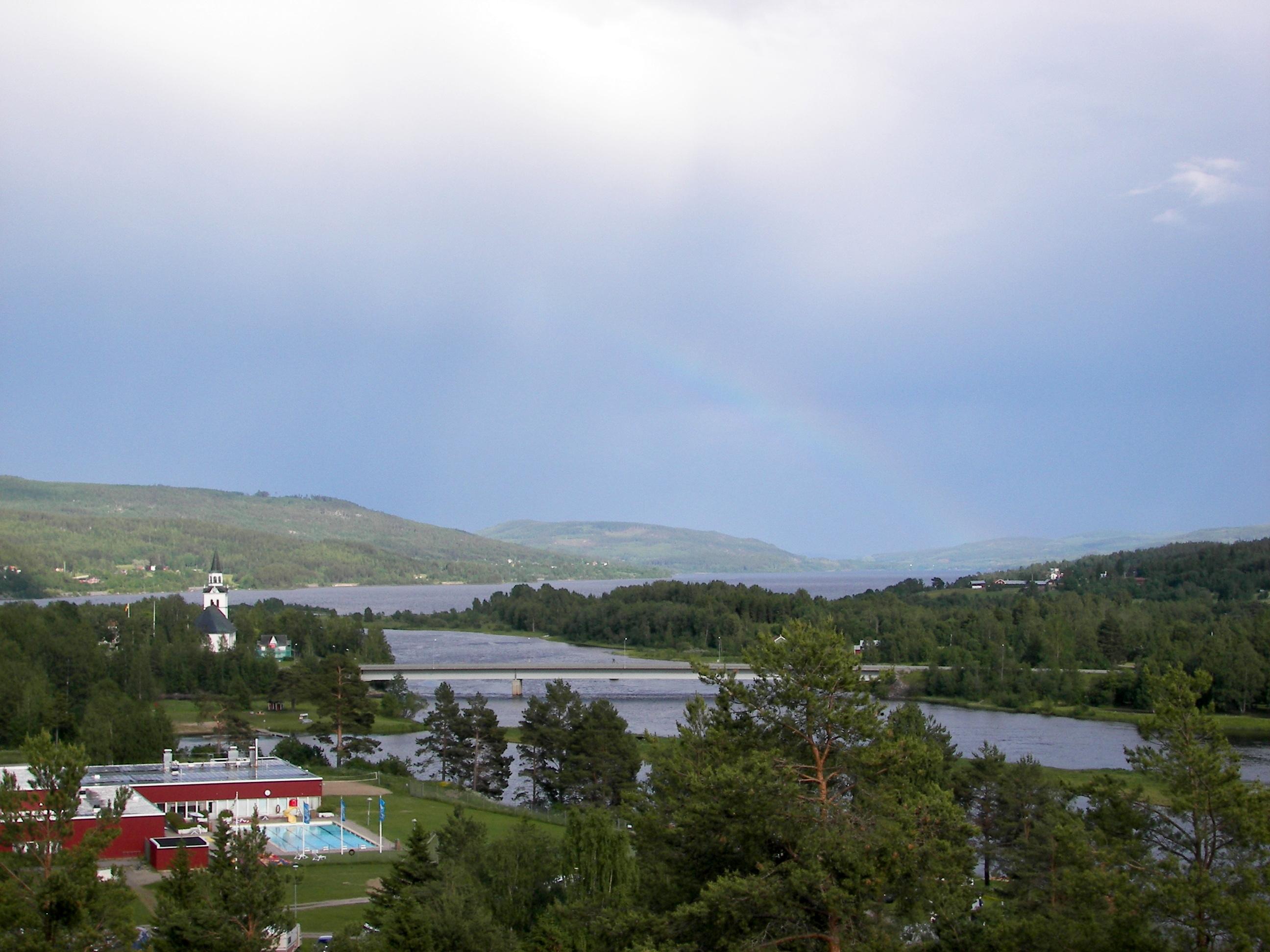 Stödesjön efter åskoväder